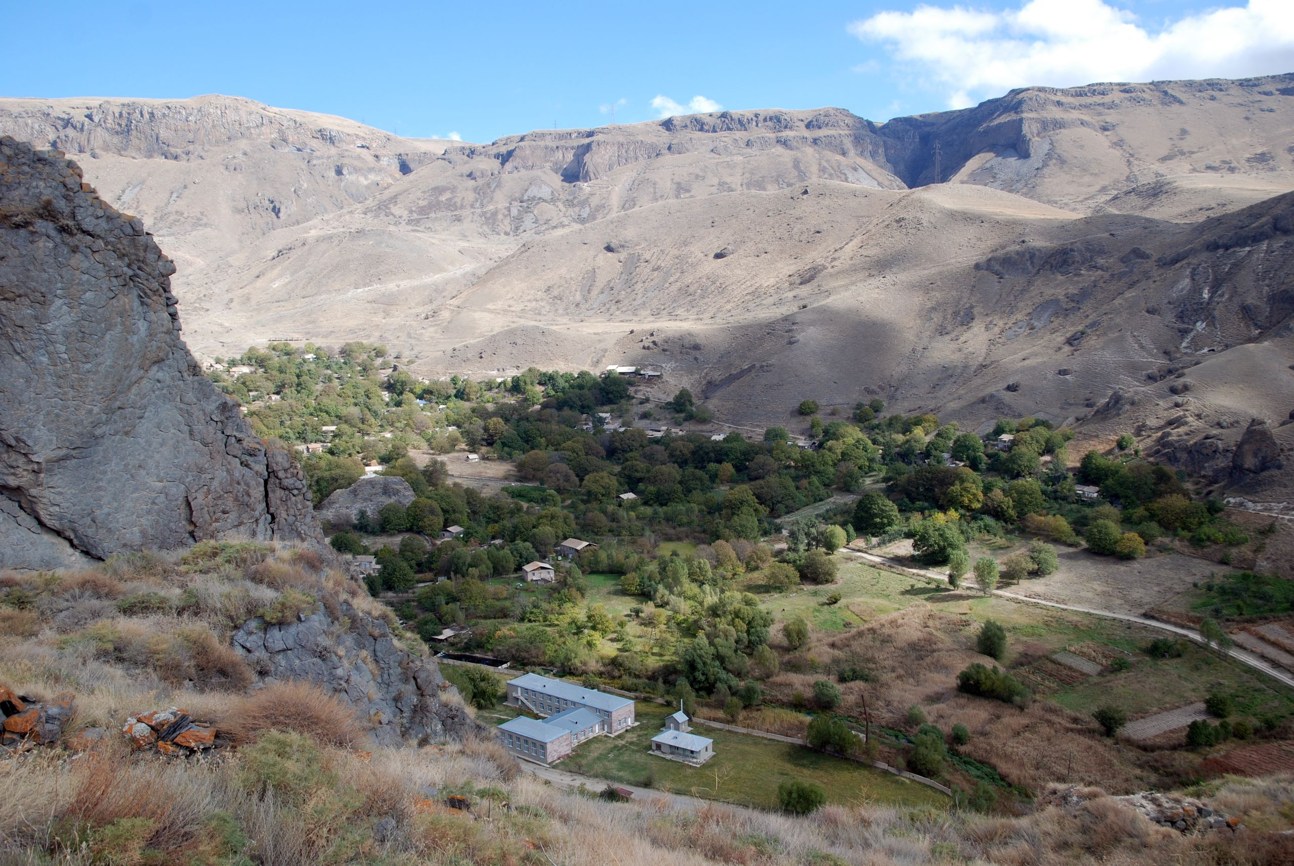 Vorotan, Syunik province